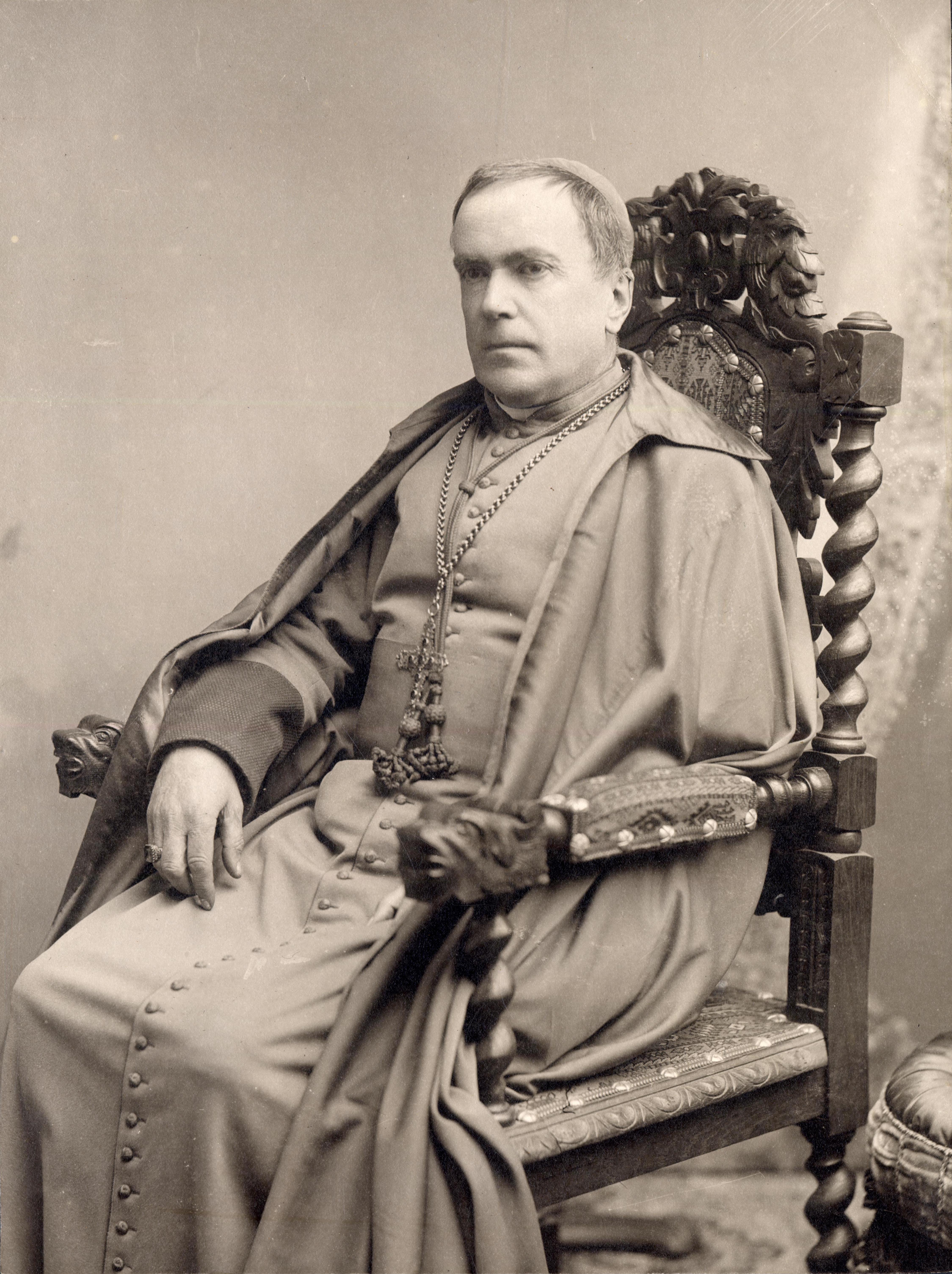 Marianao Casanova fue el cuarto Arzobispo de Santiago. Nació en el año 1833 y murió en 1906.